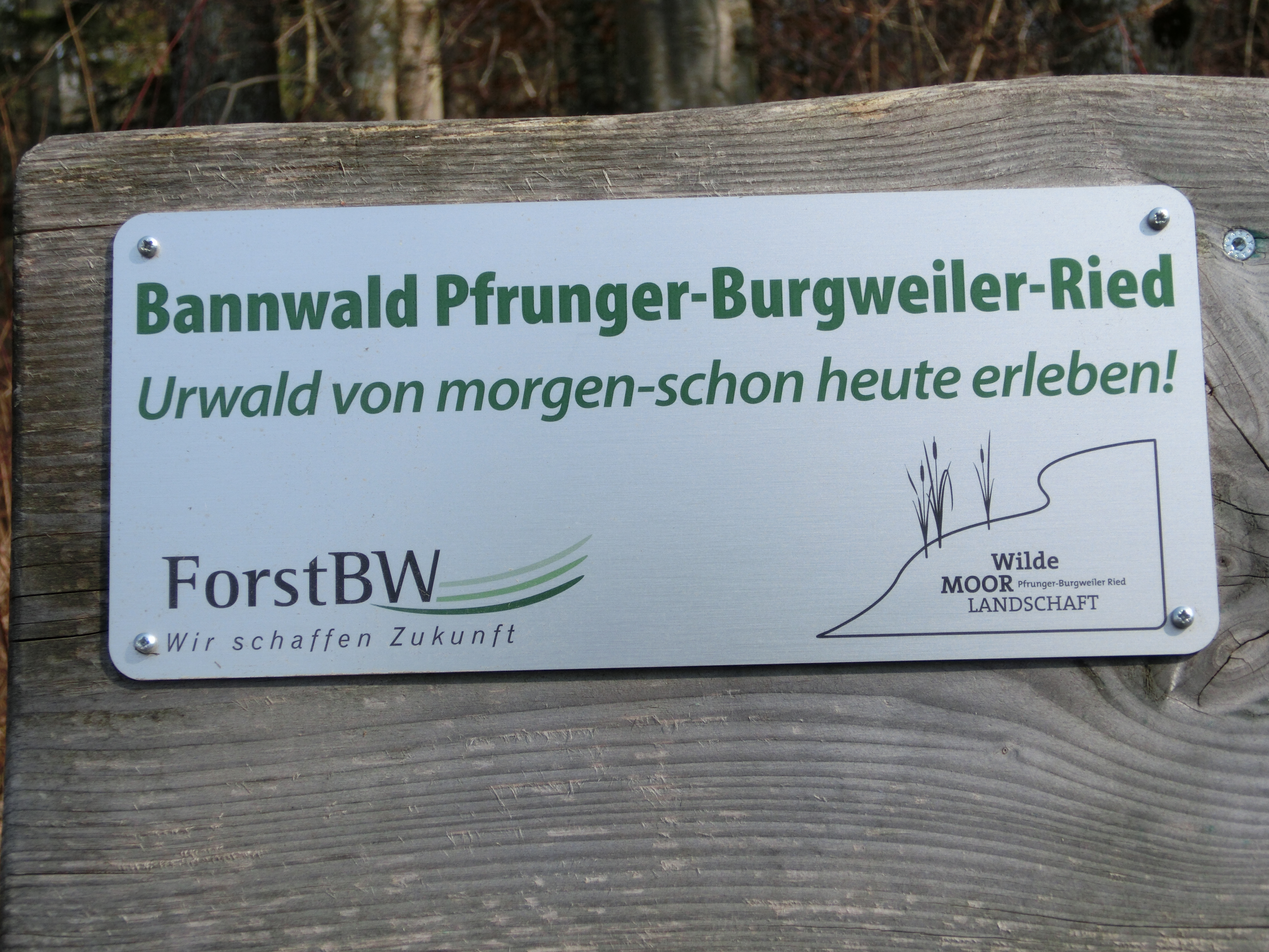 Deutschland - Baden-Württemberg - Landkreis Sigmaringen - Ostrach: Hinweisschild zum "Bannwald Pfrunger-Burgweiler Ried"